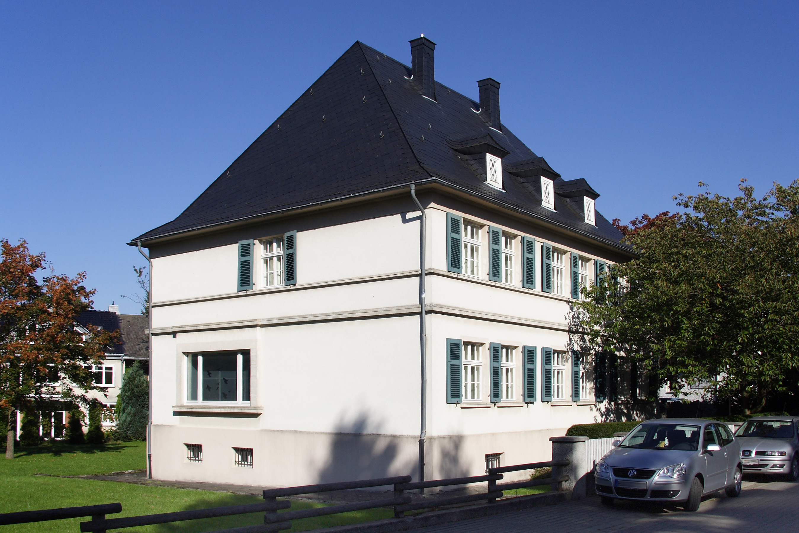 Haus Henning in Brilon (ehemaliges Stadtmuseum, Heinrich-Jansen-Weg 6